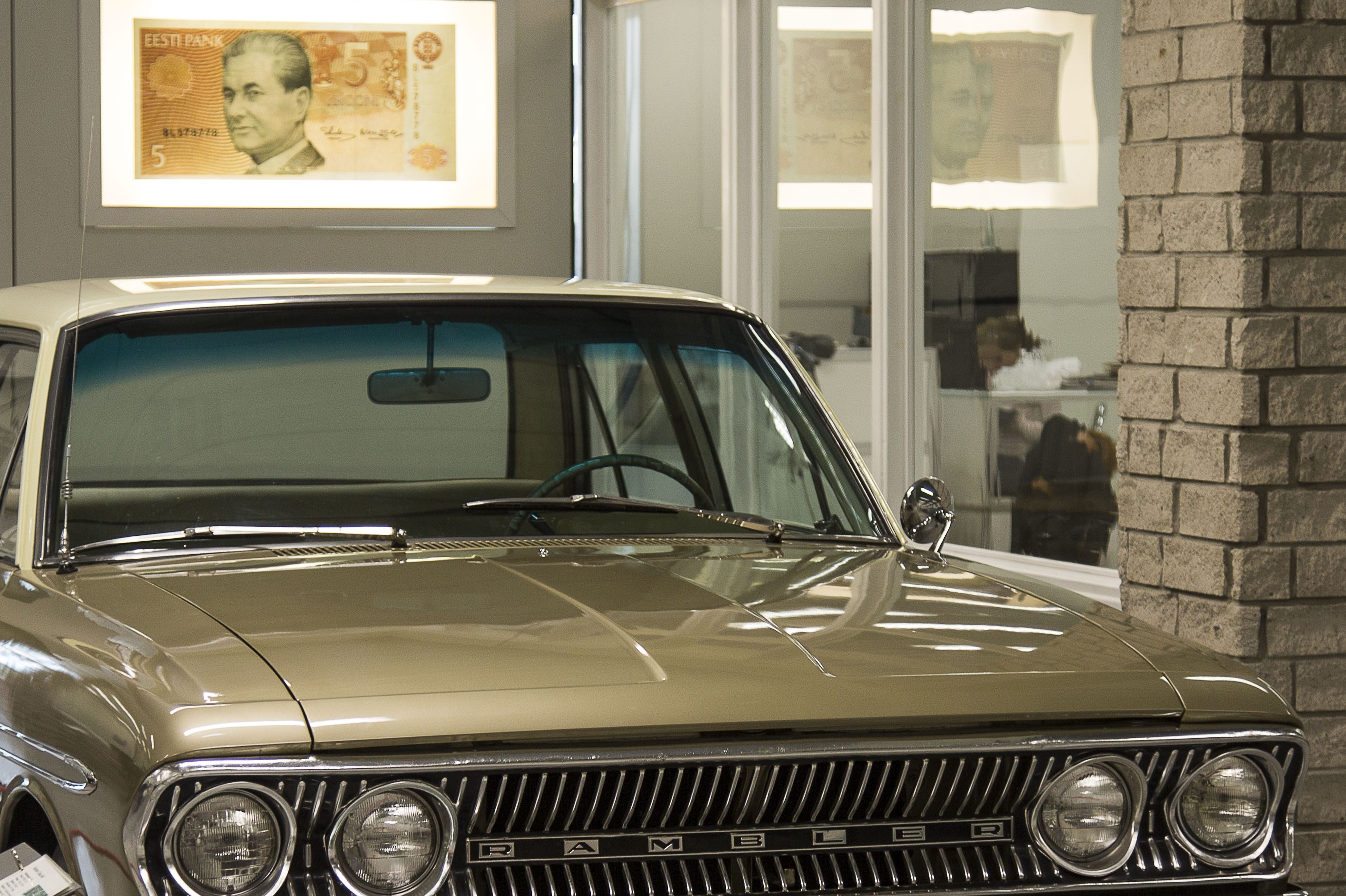 Paul Kerese Los Angelese maleturniirilt peaauhinnana võidetud Rambler Automuuseumis. 1963 Rambler Classic 660 4-Door Sedan